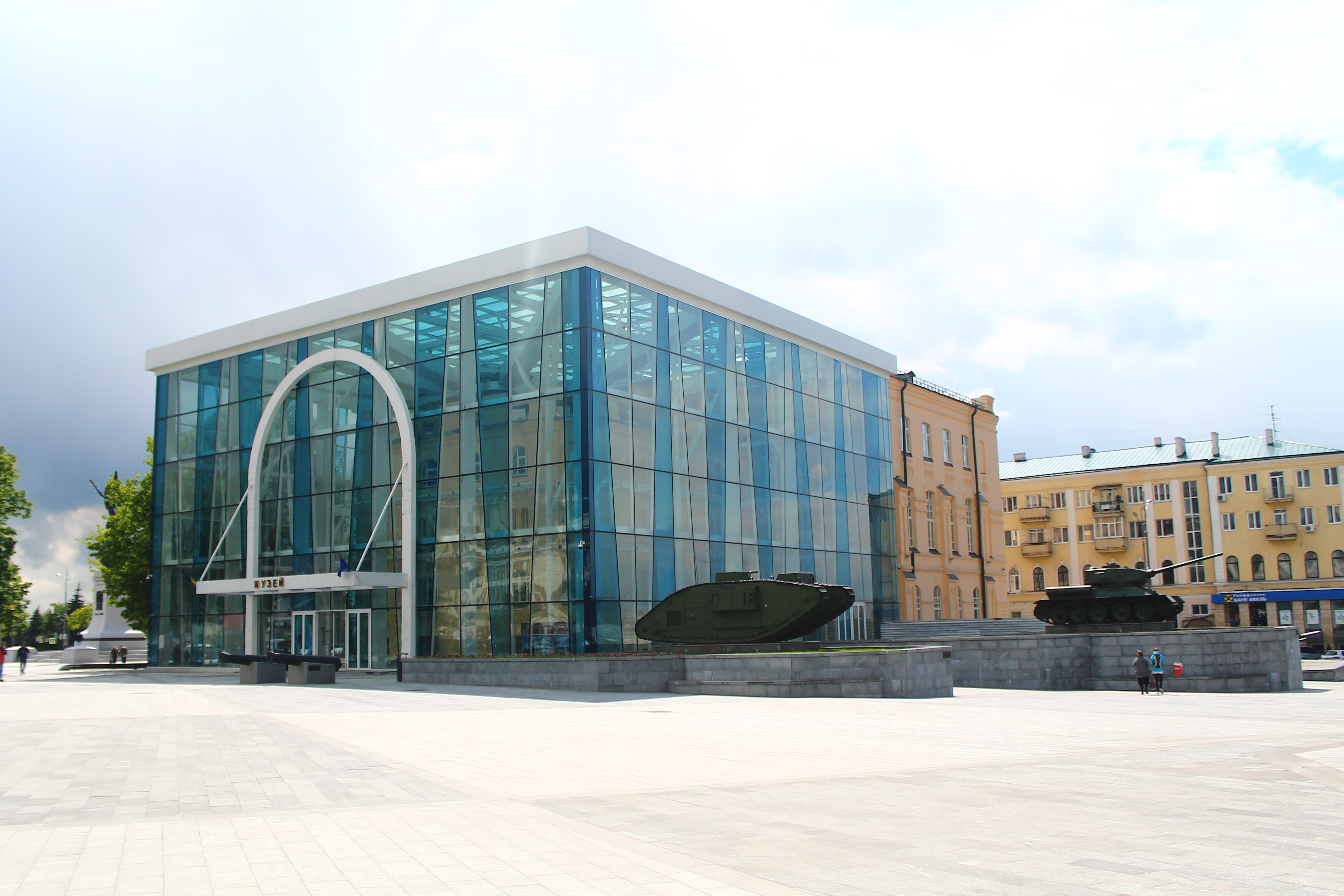 На фото зображено будівлю Харківського історичного музею, а також прилеглу територію, на якій розміщена військова техніка